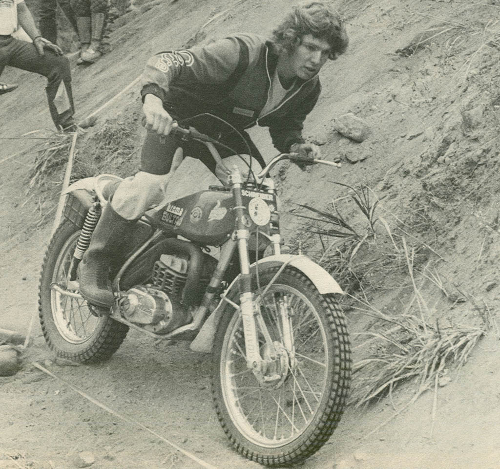 Bernie Schreiber on a Bultaco Sherpa T circa 1976